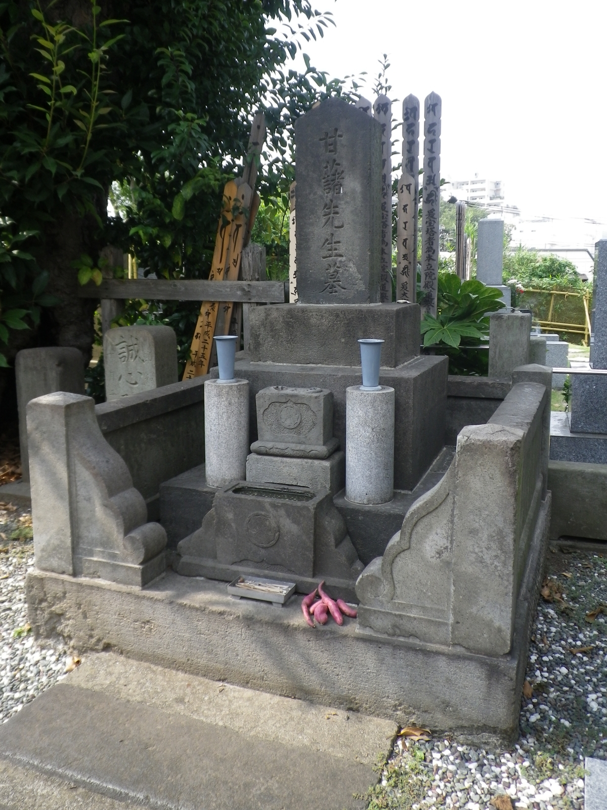 青木昆陽の墓